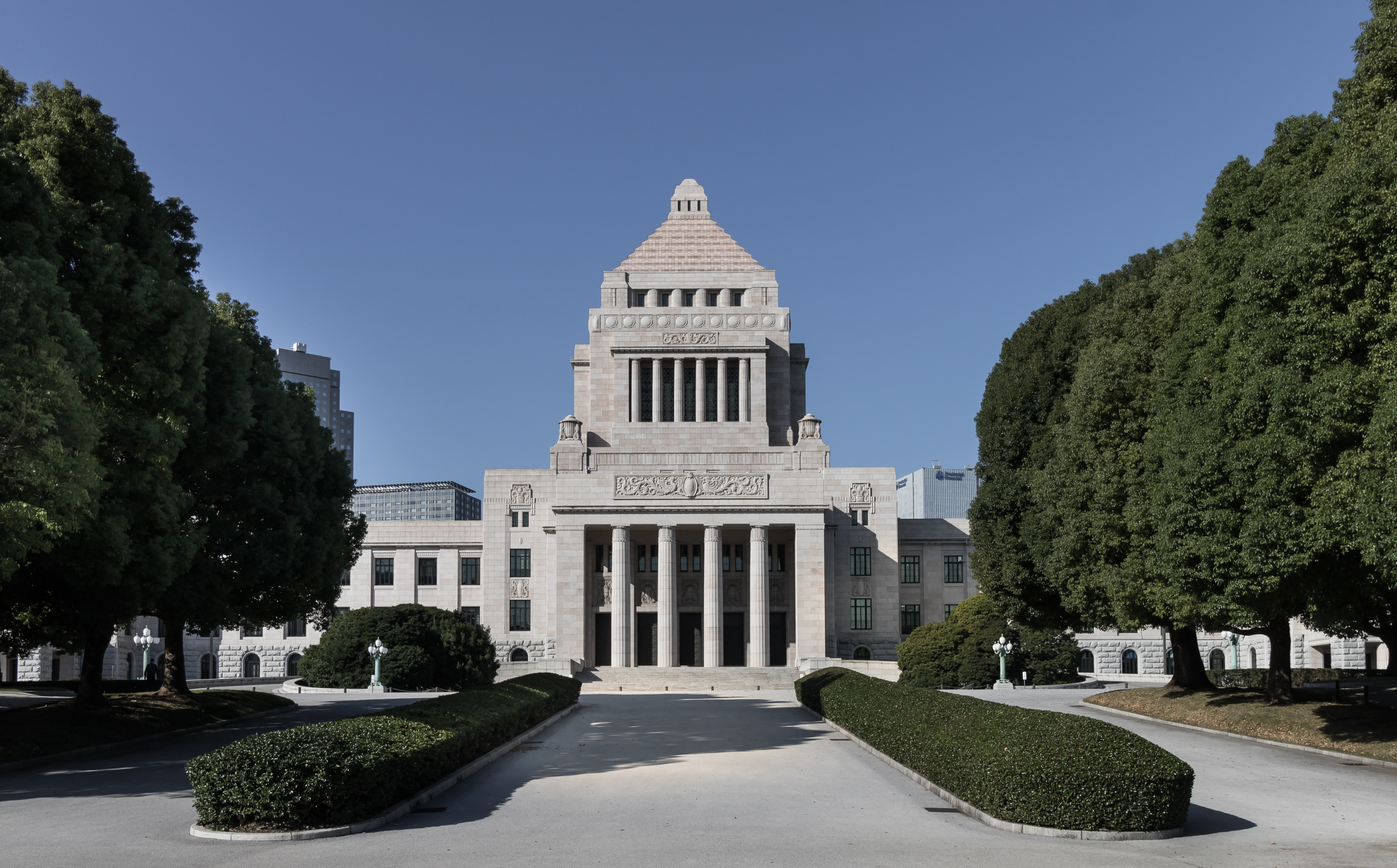 国会議事堂（東京都千代田区）